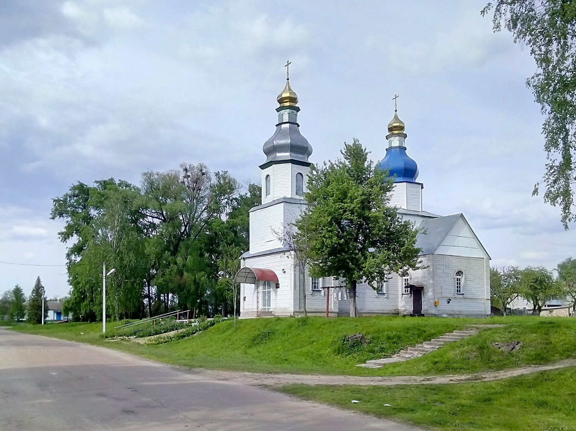 Храм Успіння Пресвятої Богородиці (УПЦ МП). Село Марківці, Бобровицький район, Чернігівська область. 2016 рік.